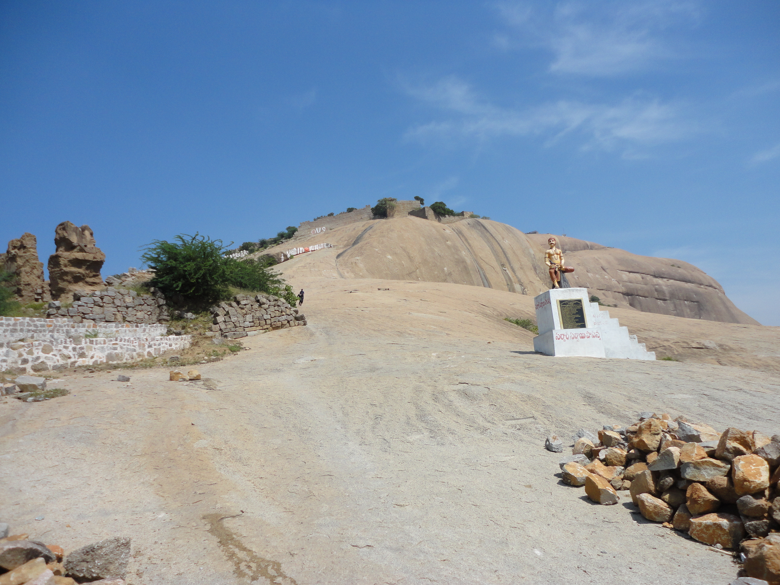 It is the entrance way of Bhongiri Fort